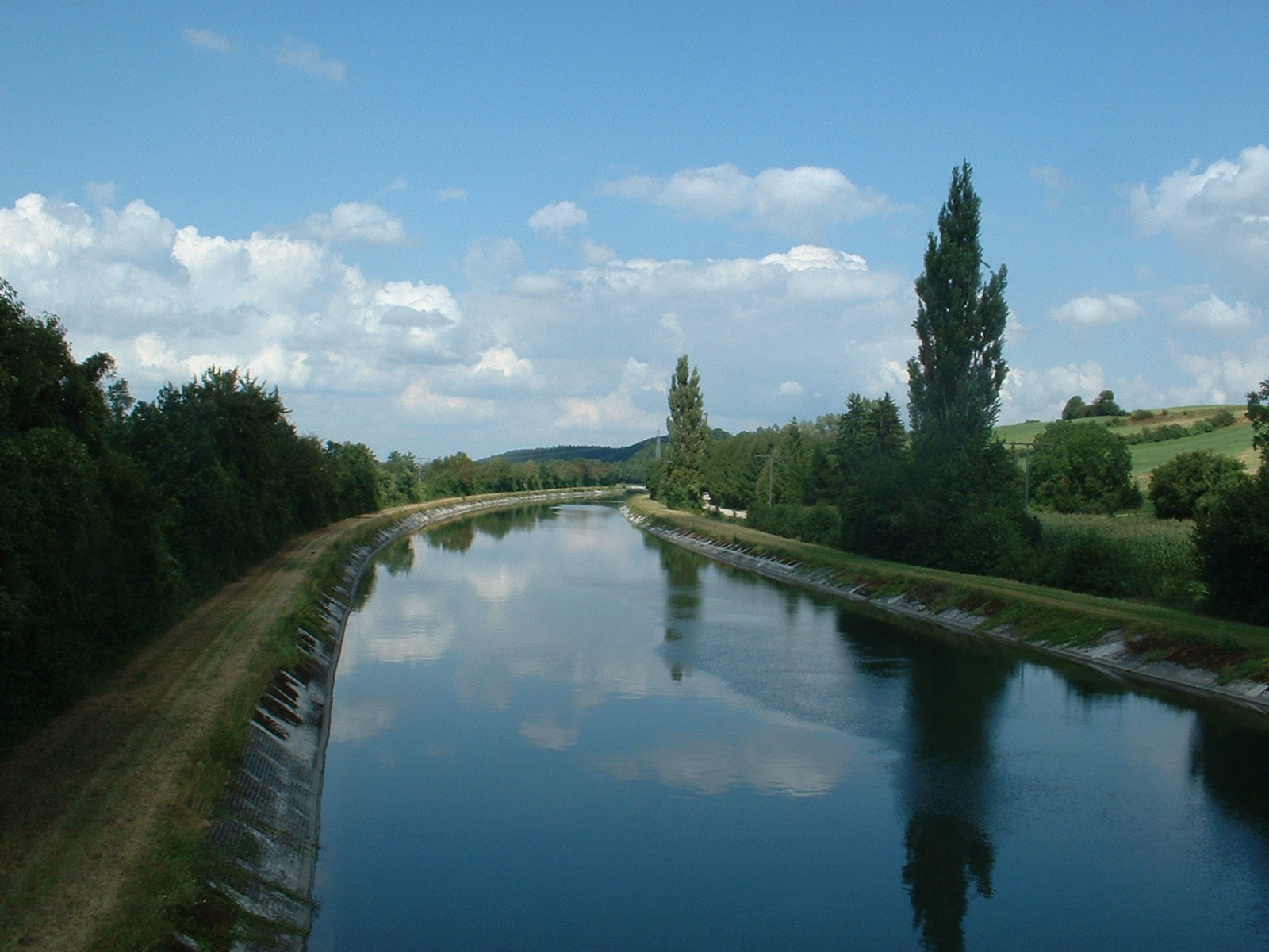 Isarkanal